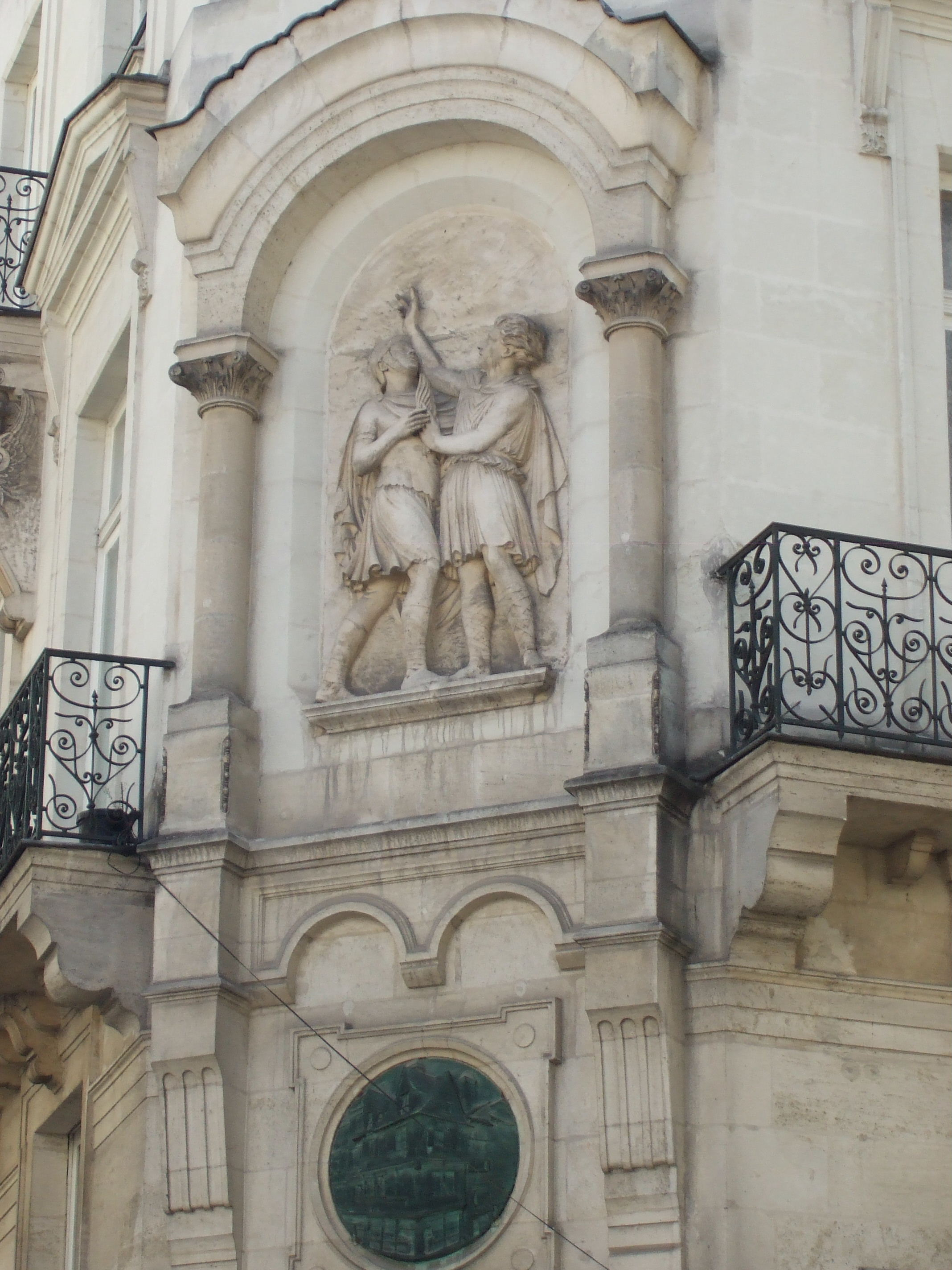 Angle des rues de la Barillerie et de la Paix, Fr-44-Nantes.